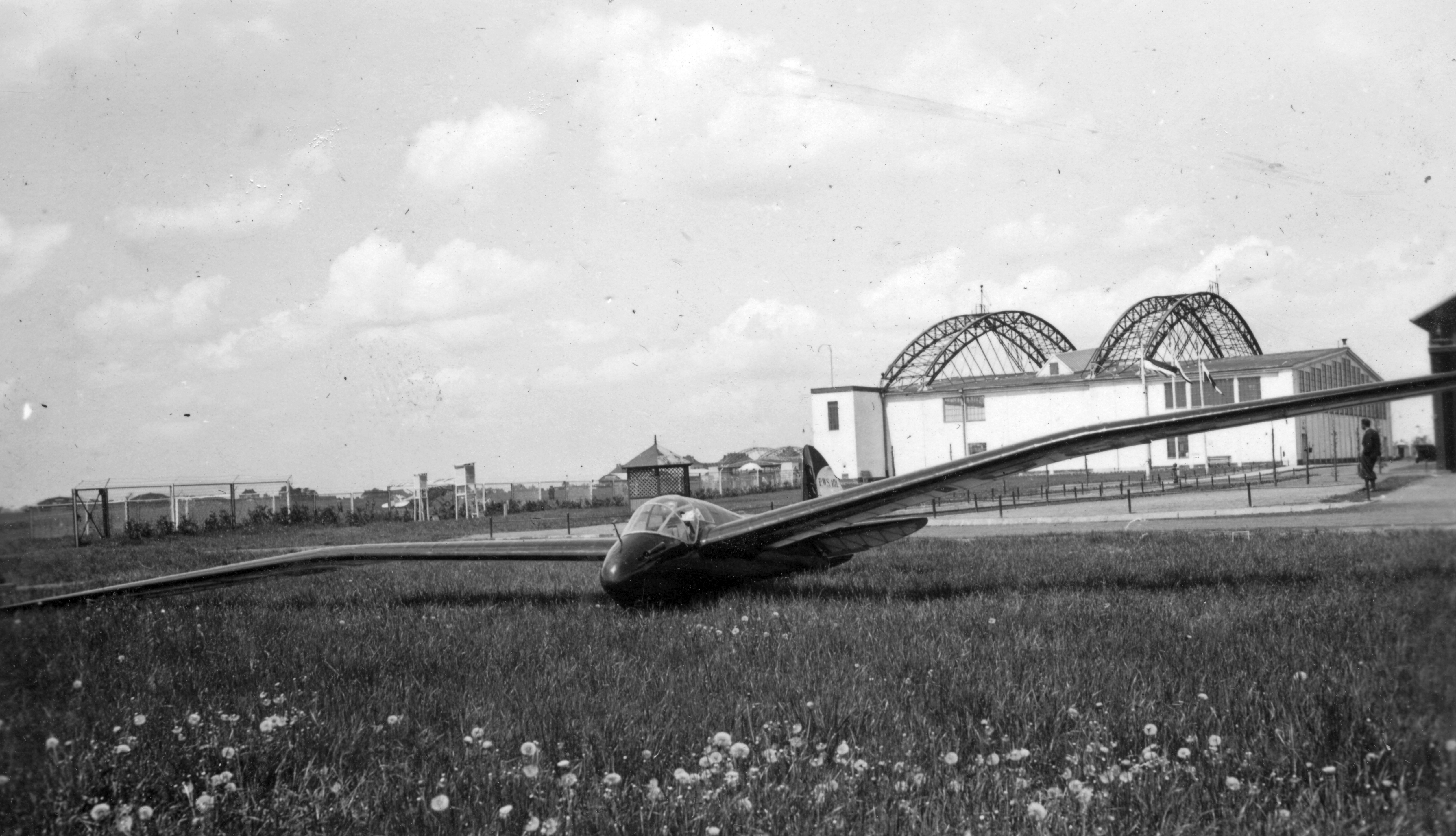 PWS-101 típusú vitorlázó repülőgép. Location: Poland Tags: sailplane, airport, hangar, airplane, PWS-brand Title: PWS-101 típusú vitorlázó repülőgép.